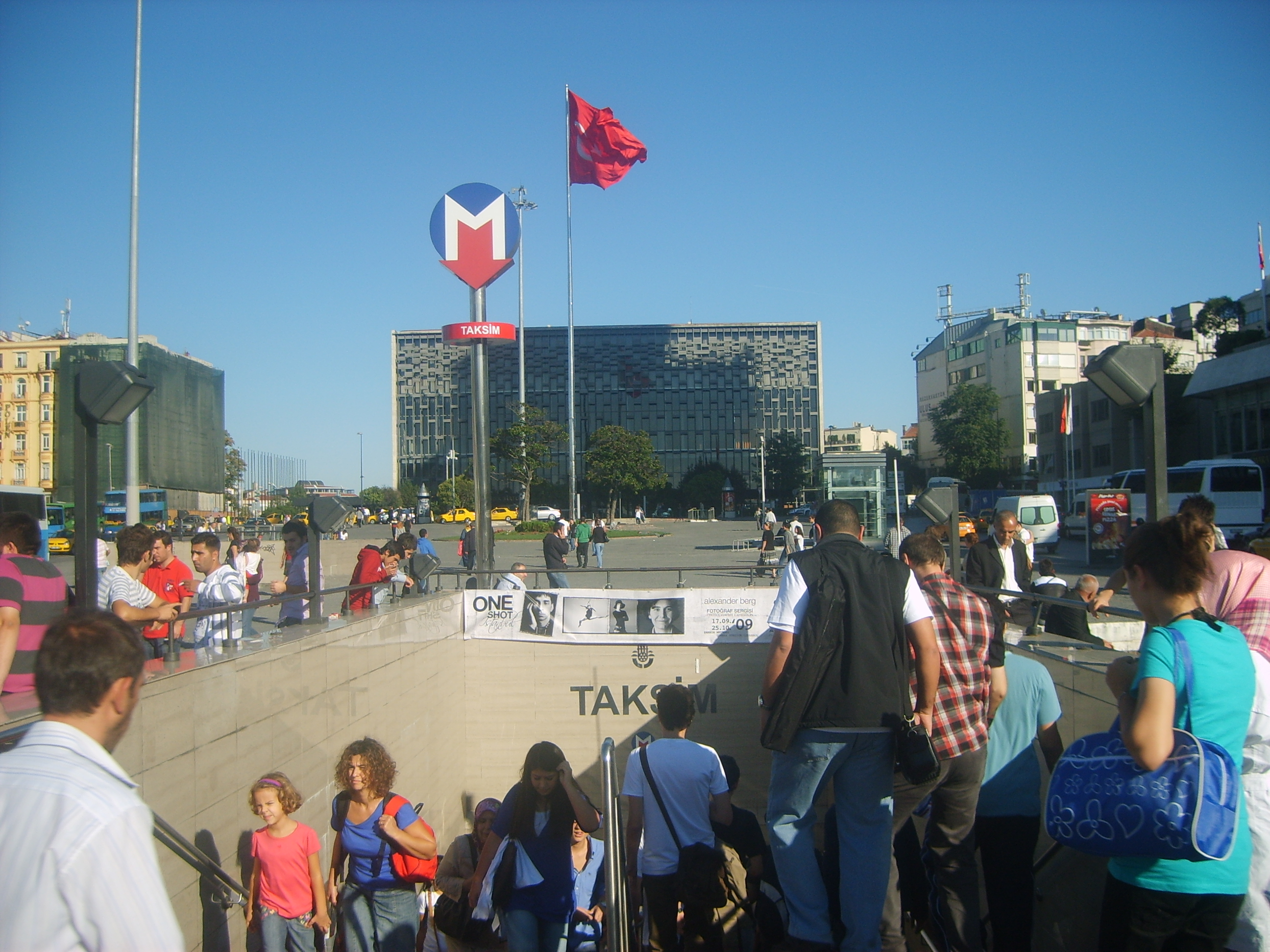 Istanbul Metrosu Taksim istasyonu İstiklâl Caddesi girişi